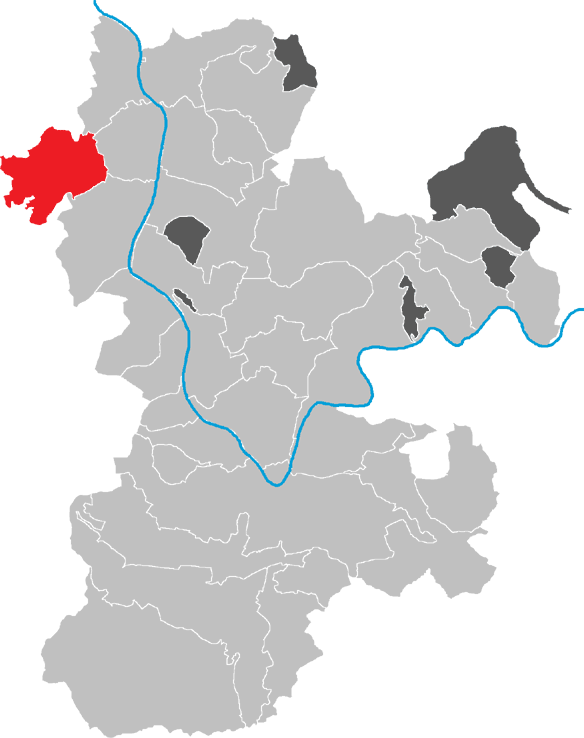 Karte von Mömlingen im Kreis Miltenberg, Bayern, Deutschland.